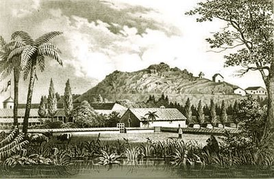 Fue a partir de la necesidad de realizar unas mediciones astronómicas, sólo posibles a partir de datos tomados desde el hemisferio sur, que la armada de EE.UU. le encargó a James Melville Gillis la misión de construir un observatorio astronómico en Chile. Llegó a Santiago de Chile en 1847 a cargo de una expedición de la Armada de los Estados Unidos .3 4 El Observatorio Astronómico Nacional fue oficialmente inaugurado en 1852, constituyéndose en uno de los primeros observatorios en Latinoamérica y quizás en el más activo durante el siglo XIX,4 ya que, en esta época se publicaron alrededor de 30 trabajos científicos en revistas internacionales especializadas de Alemania, Inglaterra y E.E.U.U.4 El gobierno de la época decidió ubicar el observatorio en la cumbre del desnudo peñón que era entonces el Cerro Santa Lucía. Después de realizar su tarea, Gillis incorporó en su informe una valiosa descripción de Santiago, que complementó con un dibujo panorámico de la ciudad en 360 grados en 1855. Se basa en un daguerrotipo tomado por el antropólogo E. R. Smith, en base al cual Gillis elabora un dibujo, que luego fue pasado a litografía para su reproducción por T. Sinclairs. Una reproducción del original se encuentra actualmente en el Museo Histórico Nacional. Su valor se constituye por ser pionero en una serie de nuevos trabajos sobre vistas panorámicas que se realizaron en años consecutivos